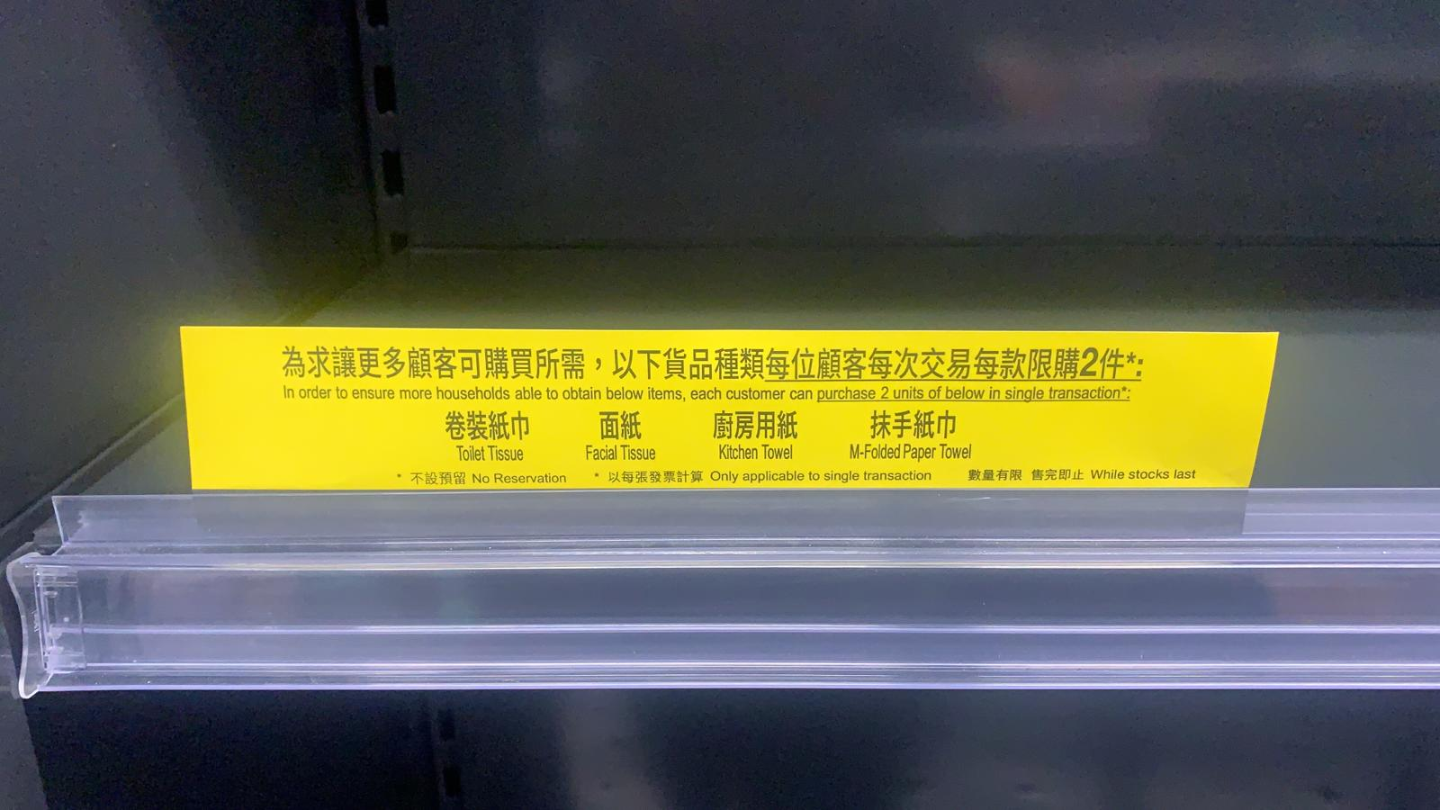 中文（香港）: 這圖片展示了貨品限購，在東涌購物時拍攝